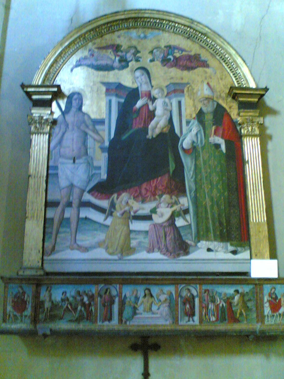 Madonna col Bambino (Benvenuto di Giovanni), Collegiata di San Martino), Sinalunga (Siena, Italy)